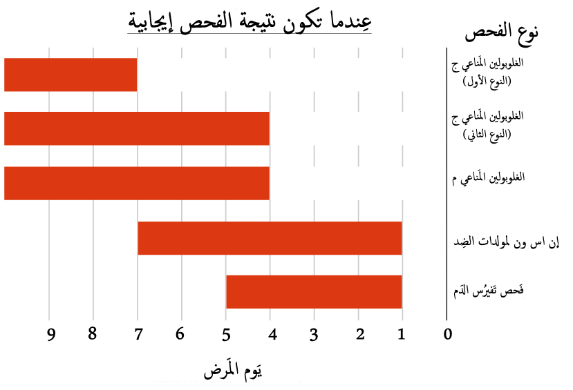 النتائج الإيجابية لفحوصات حمض الضنك